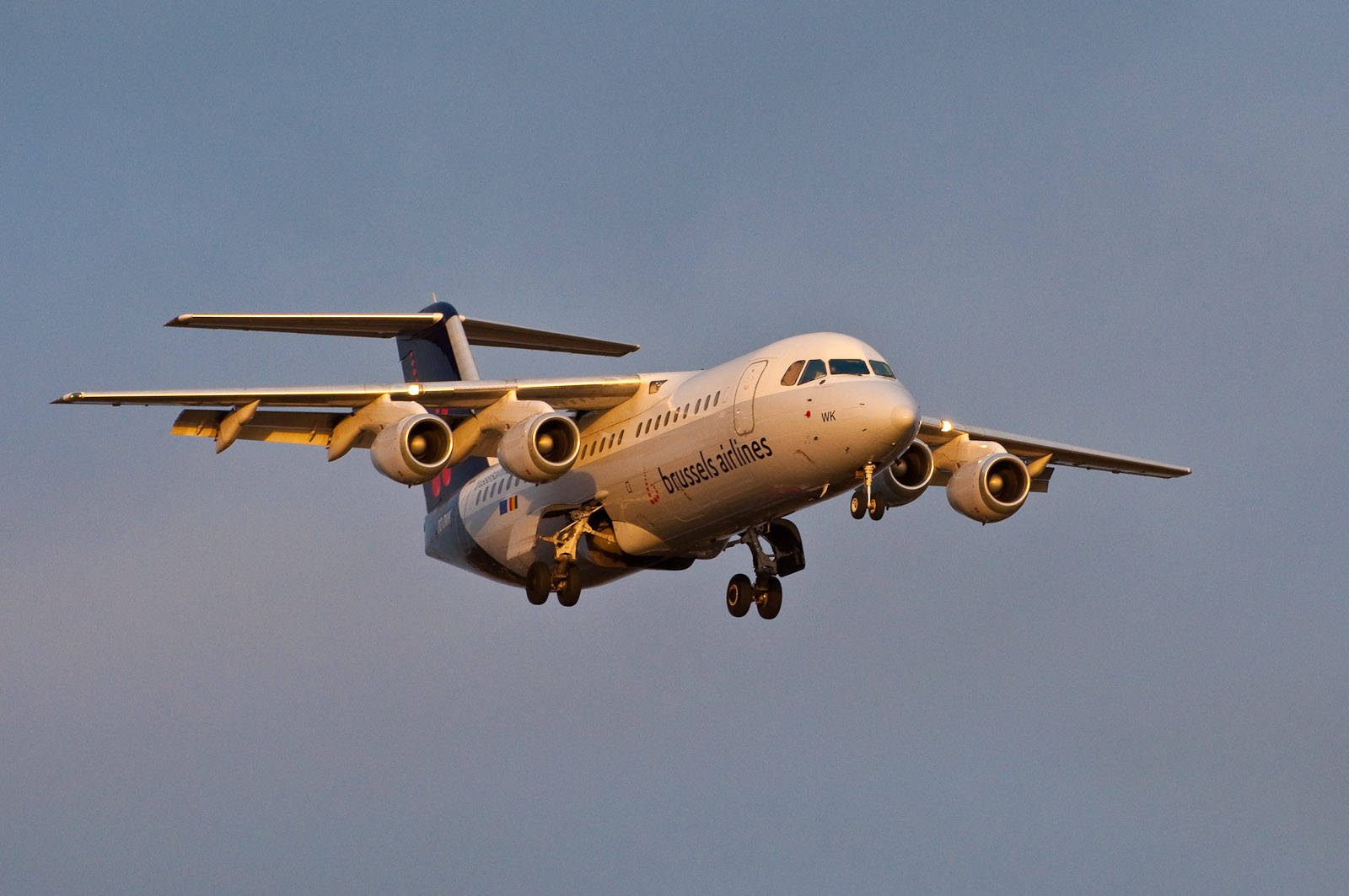 Brussels Avro RJ85